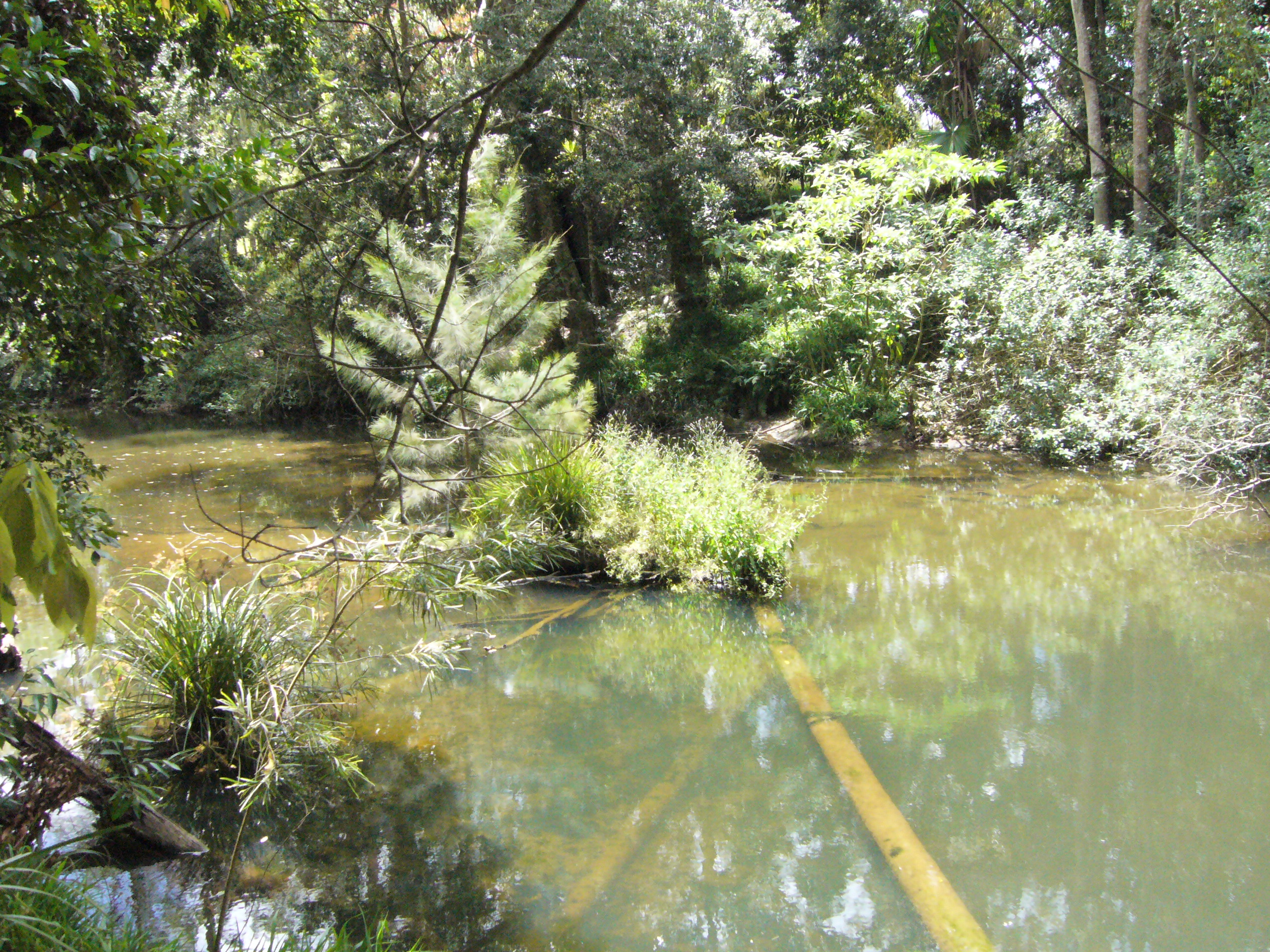 Broken River im Eungella Nationalpark